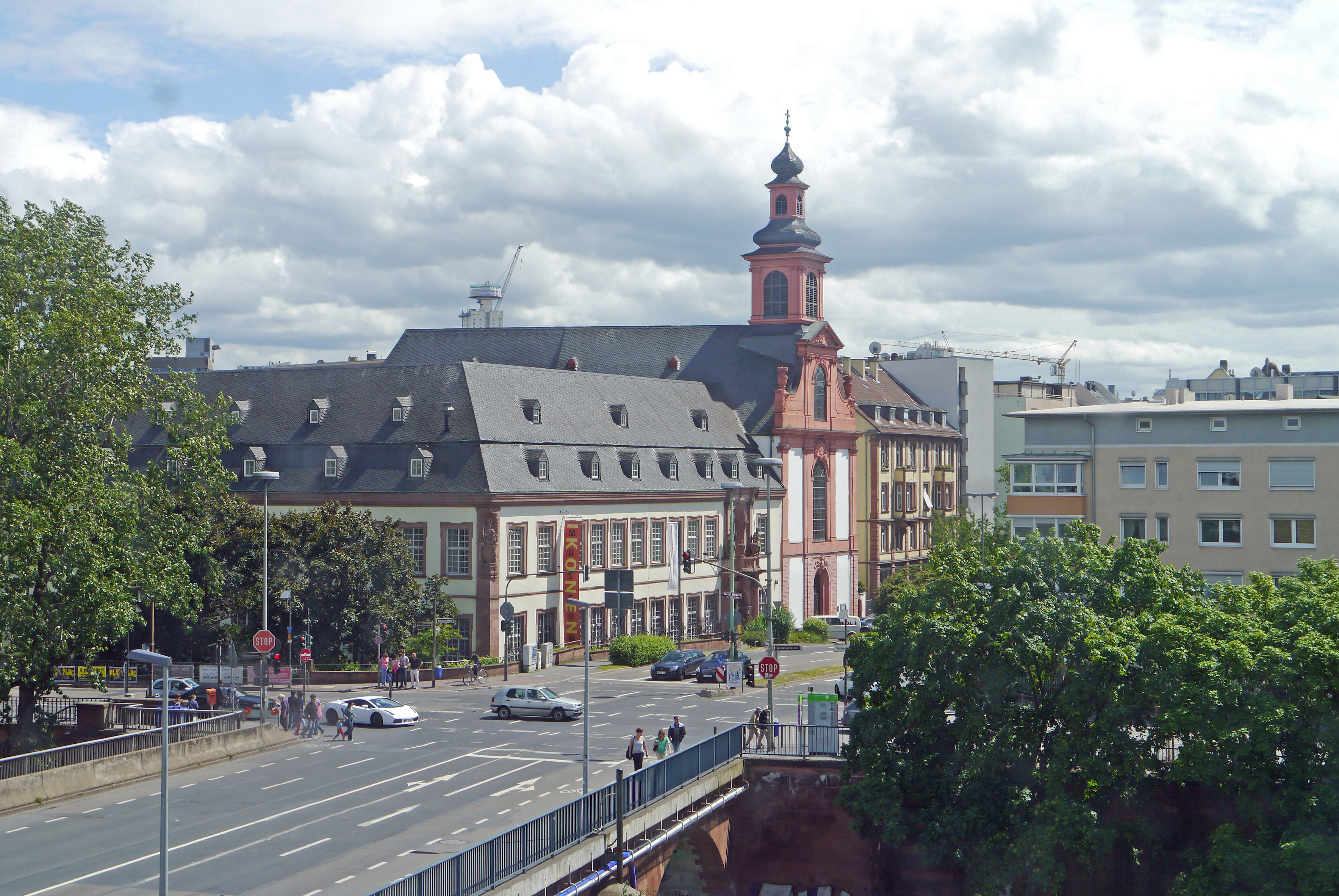 Deutschordenshaus und -kirche (2013) in Frankfurt am Main. Blick vom "Neuen Portikus".